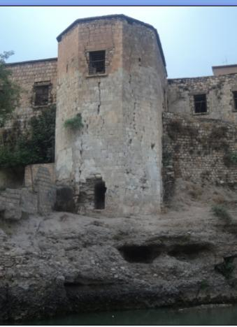 صورة لقلعة زاخو